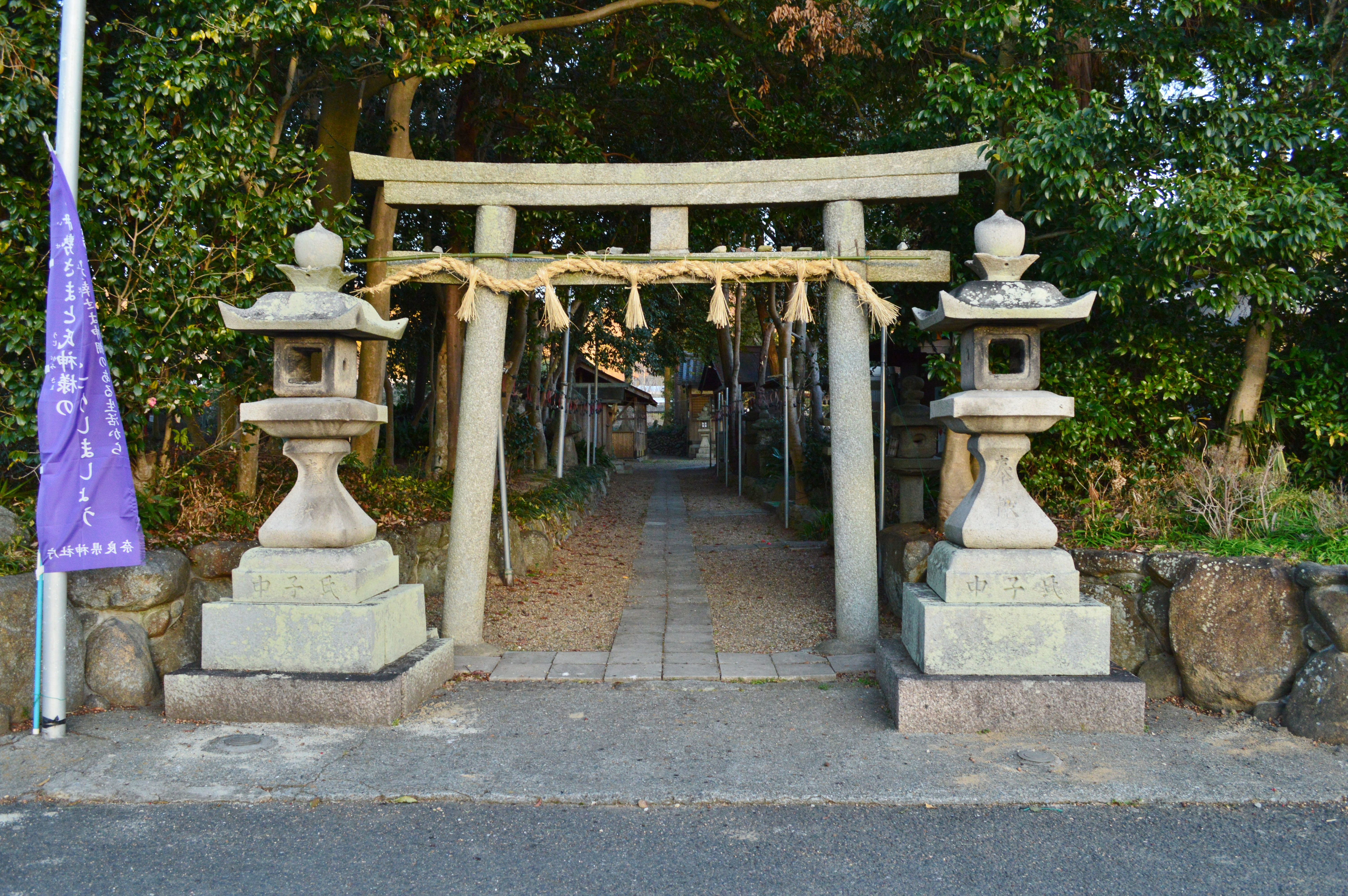 平群坐紀氏神社 鳥居 Nikon D3200